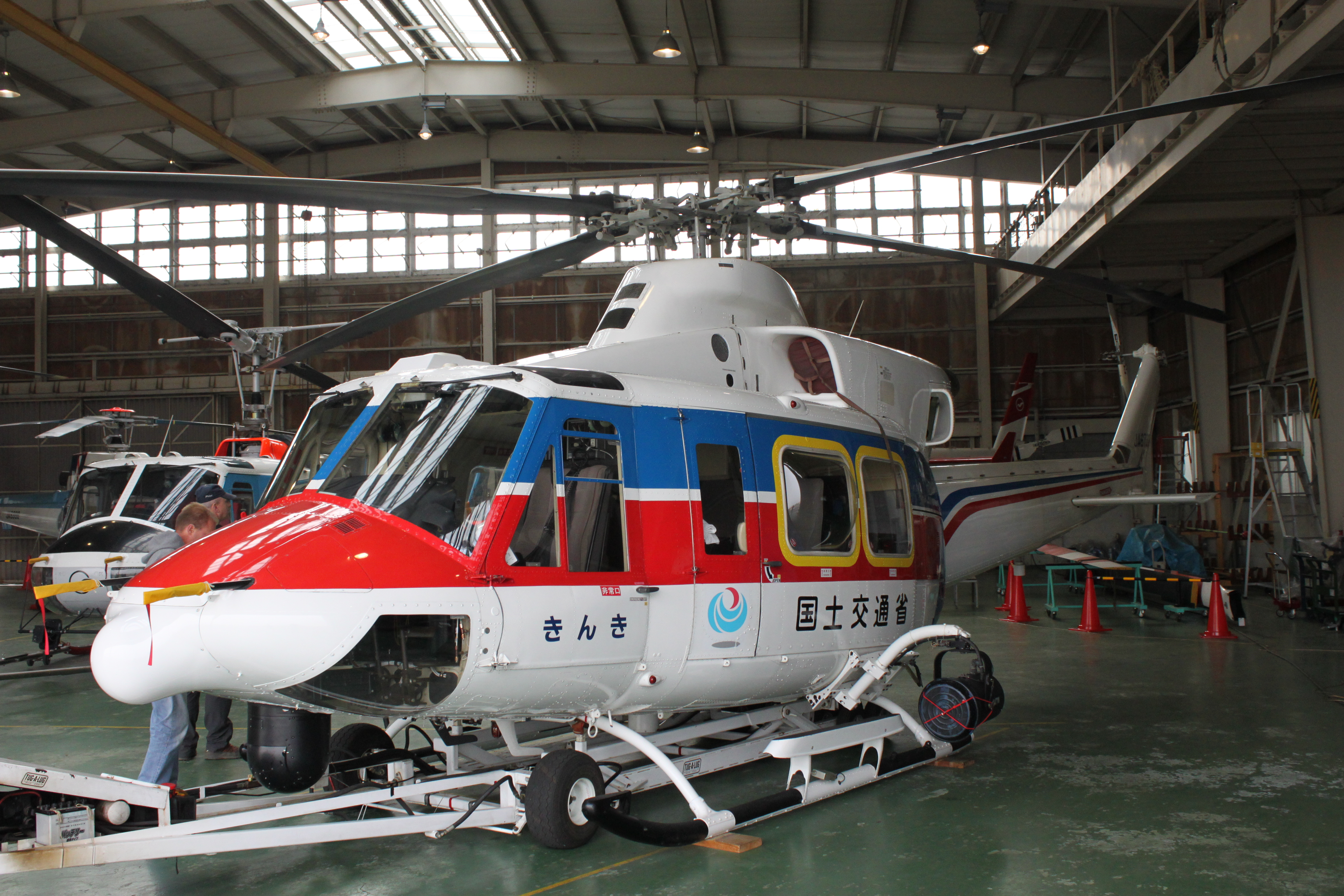 Bell 412